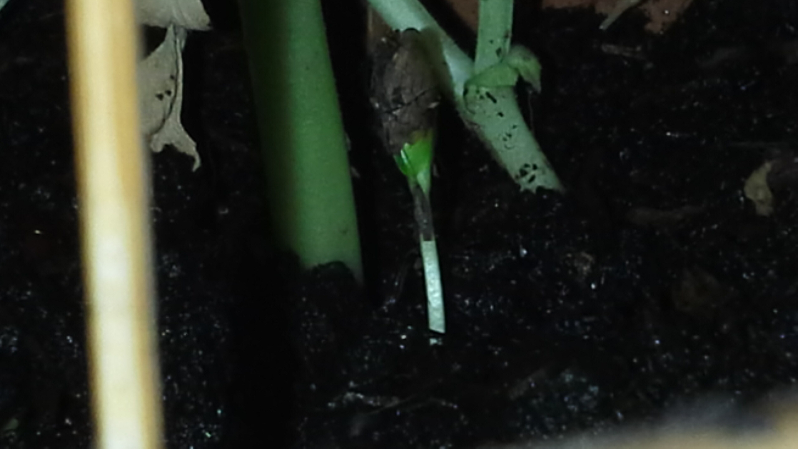 Cette photo représente la germination du pommier